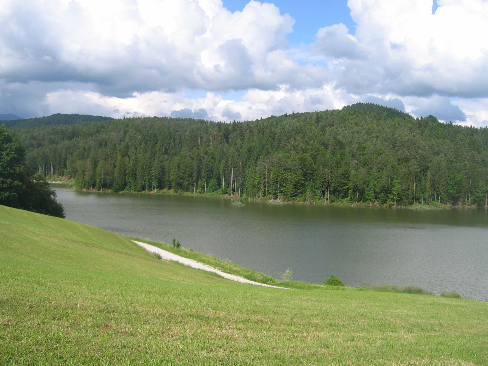 Gradišče lake, Slovenia (near Lukovica)